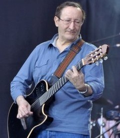 Idir au concert pour l'égalité de SOS-Racisme